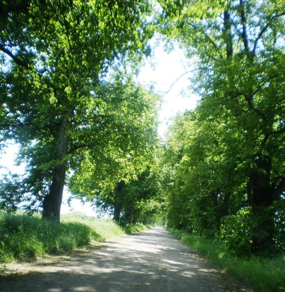 Liepų alėja, Lančiūnava, Kėdainių raj.